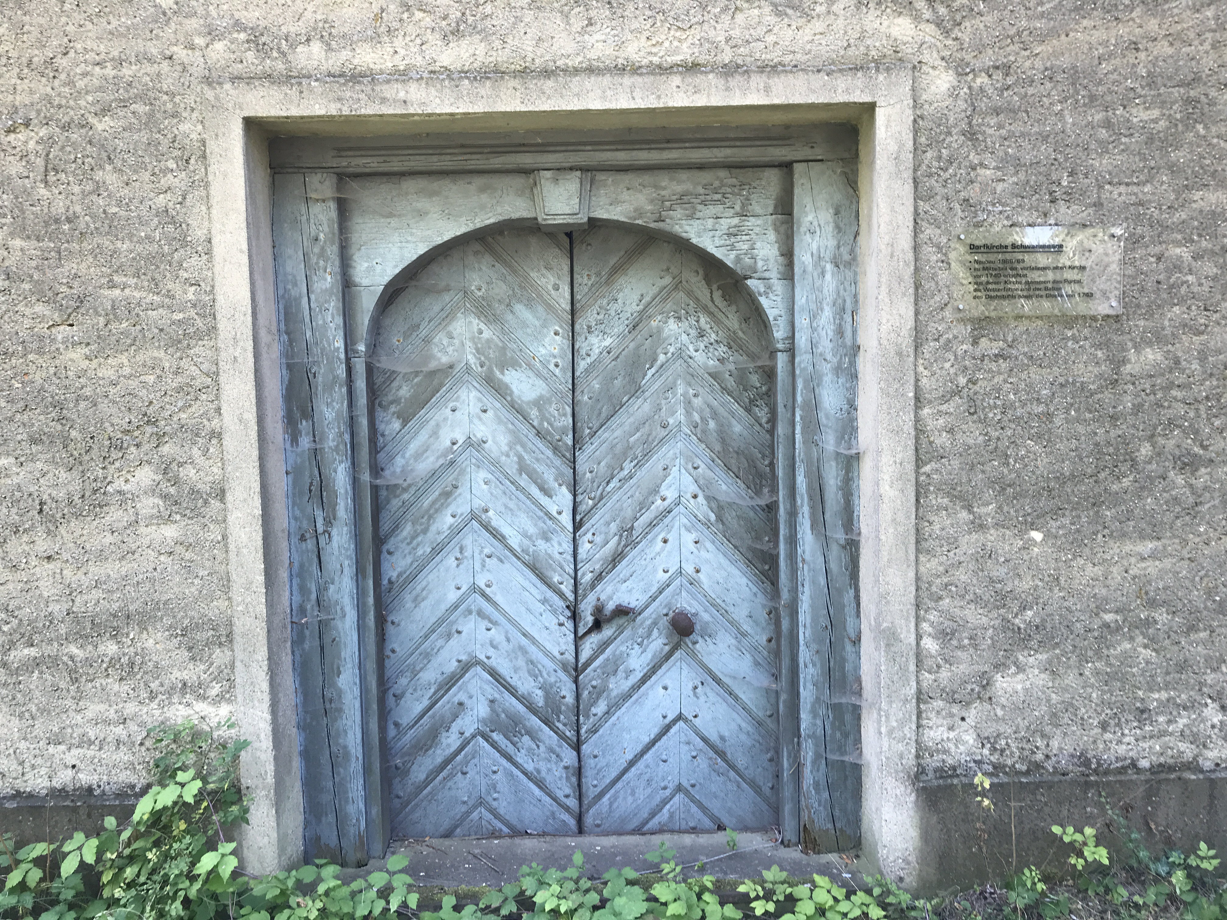 Die Dorfkirche Schwarzensee in Schwarzensee, einem Ortsteil der Stadt Strasburg (Uckermark) ist ein Sakralbau im Landkreis Vorpommern-Greifswald in Mecklenburg-Vorpommern. Im Turm hängt eine Glocke aus dem Jahr 1743.